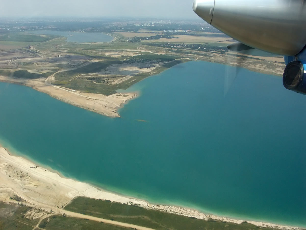 Der Störmthaler See (Alte Ortslage von Magdeborn), oberer Bildteil von rechts: Güldengossa, Auenhain, Markkleeberger See, Deponie Cröbern